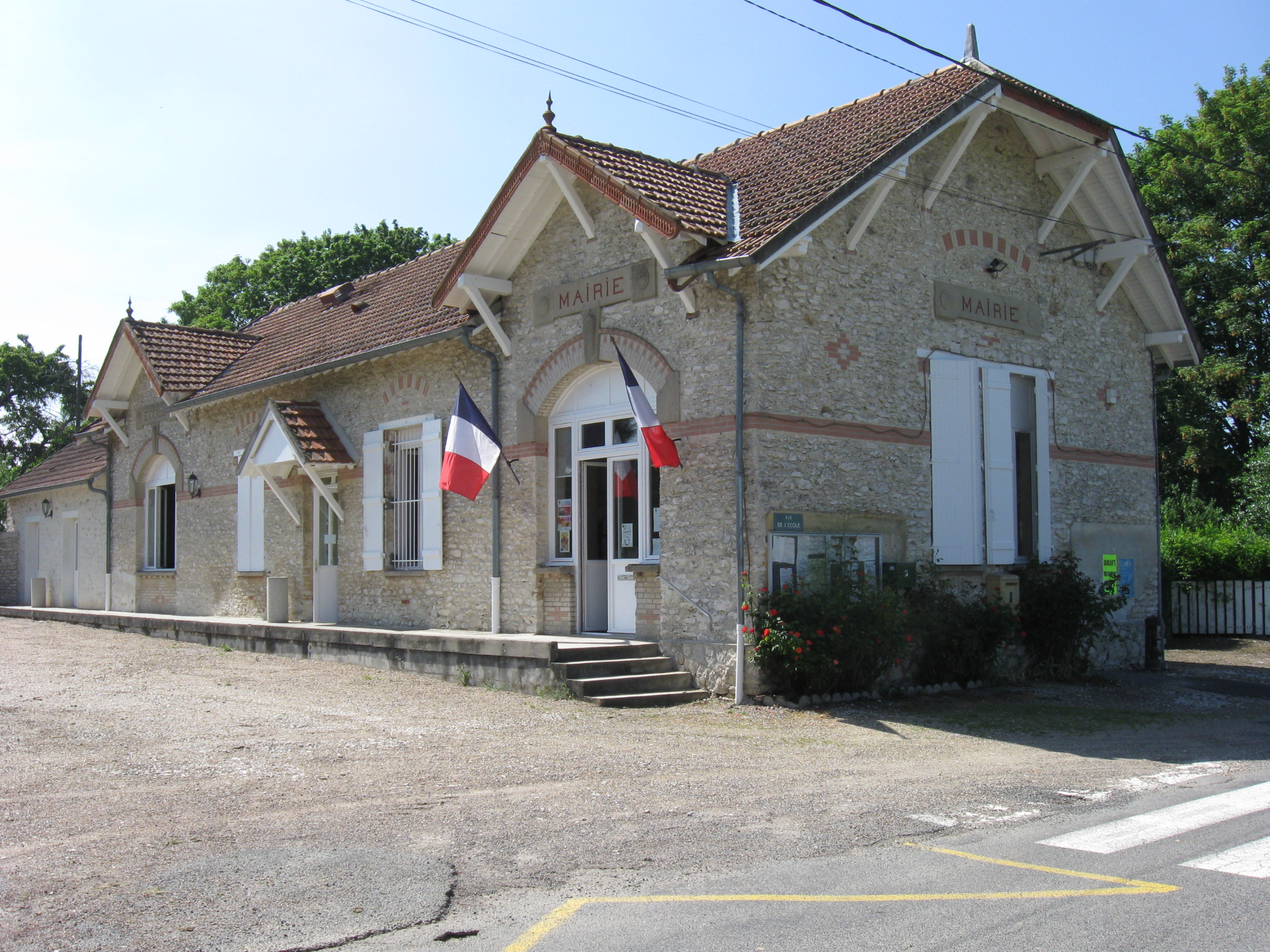 Mairie de Saint-Just-en-Brie. (Seine-et-Marne, région Île-de-France).